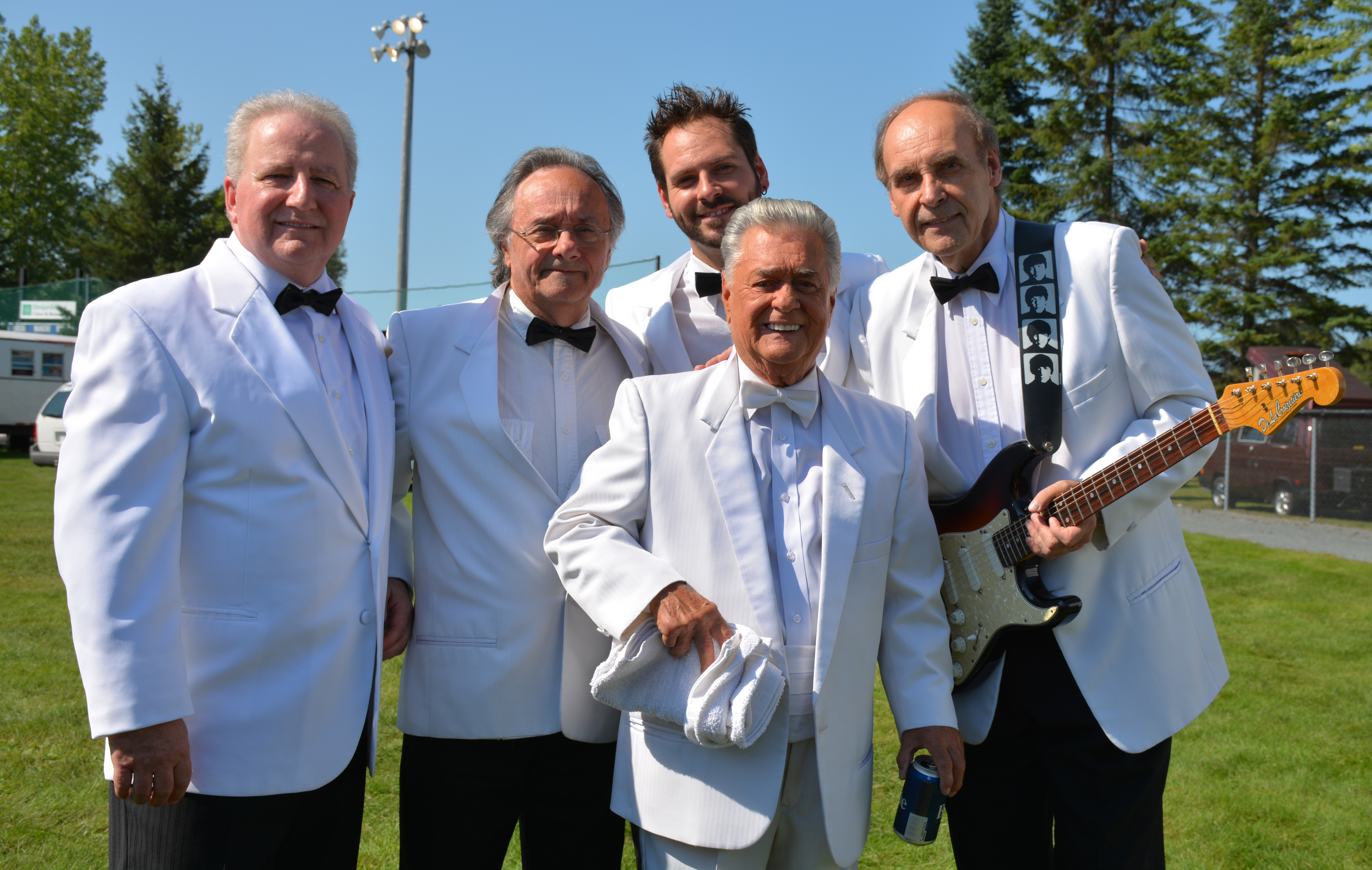 Photo de Gilles Girard au Festival des travailleurs 2016